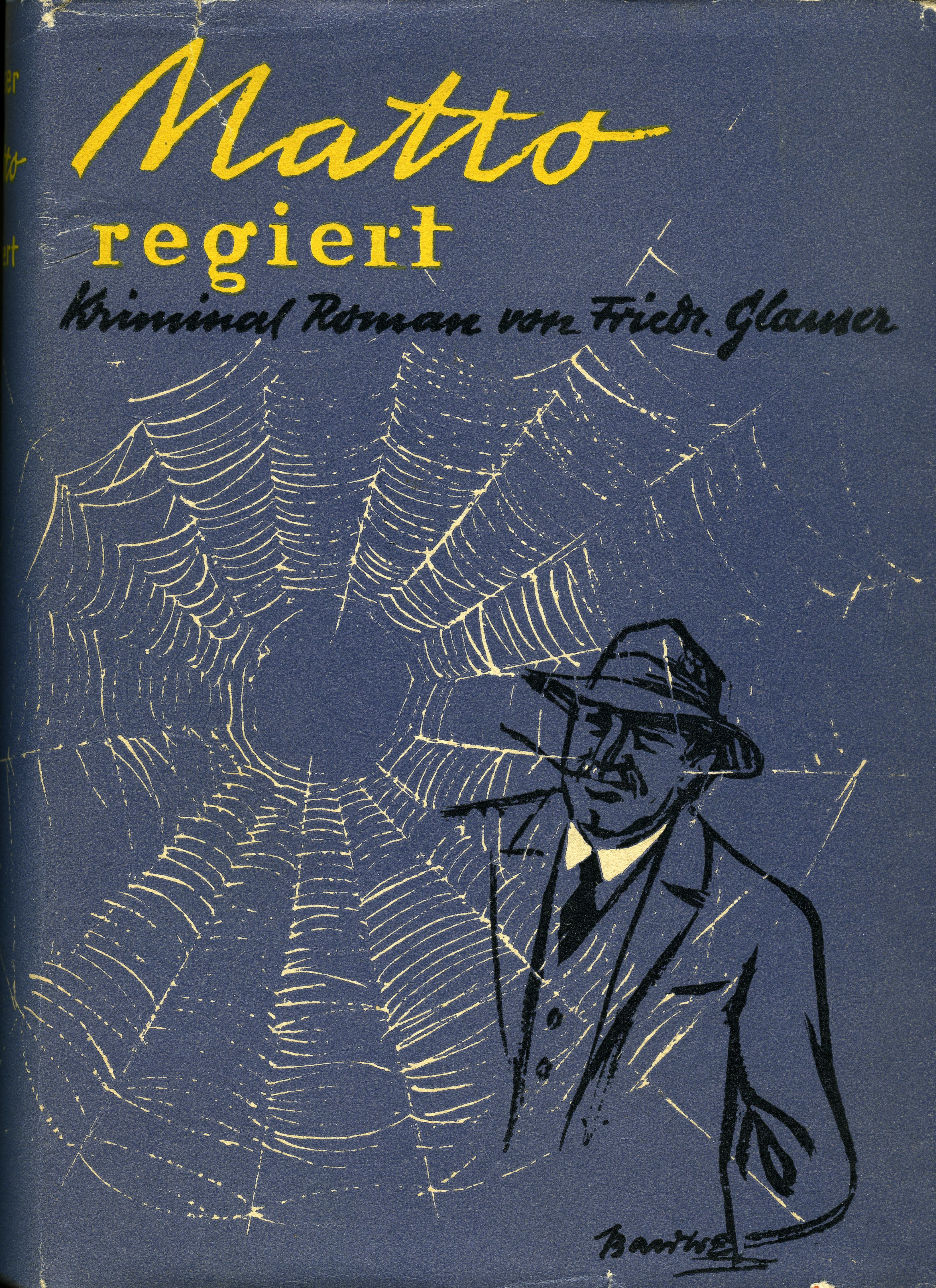 "Matto regiert" in der Buchausgabe (mit SU) des "Schweizer Druck- und Verlagshaus", Zürich 1943. Verlag wurde übernommen vom Oesch Verlag, Zürich